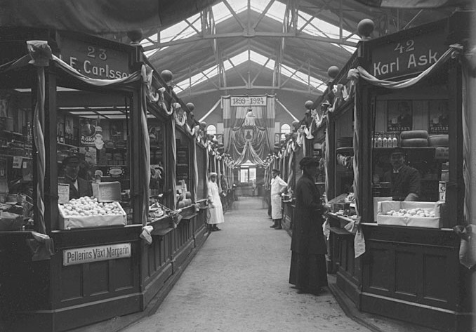 Maria Saluhall, Hornsgatan 72